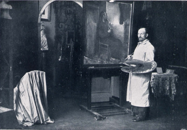 Maximilian Schäfer (1851-1916), deutscher Maler.